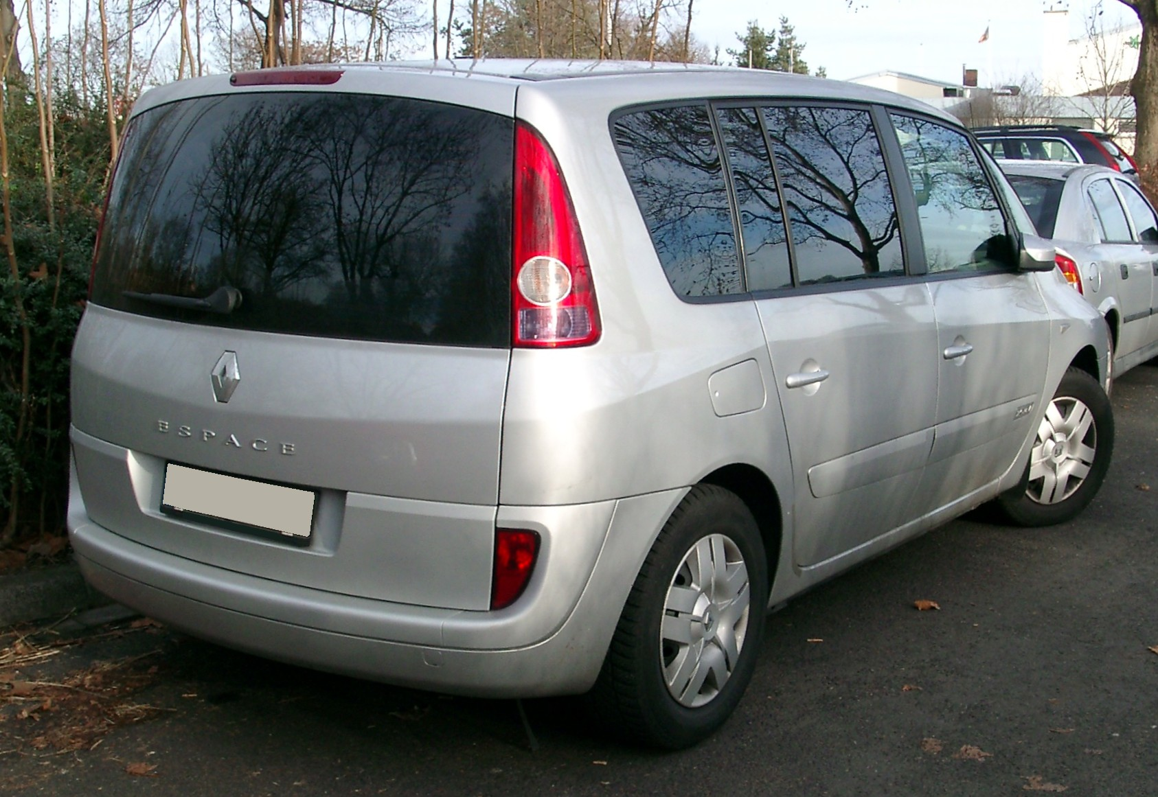 Renault Espace, 4. Generation